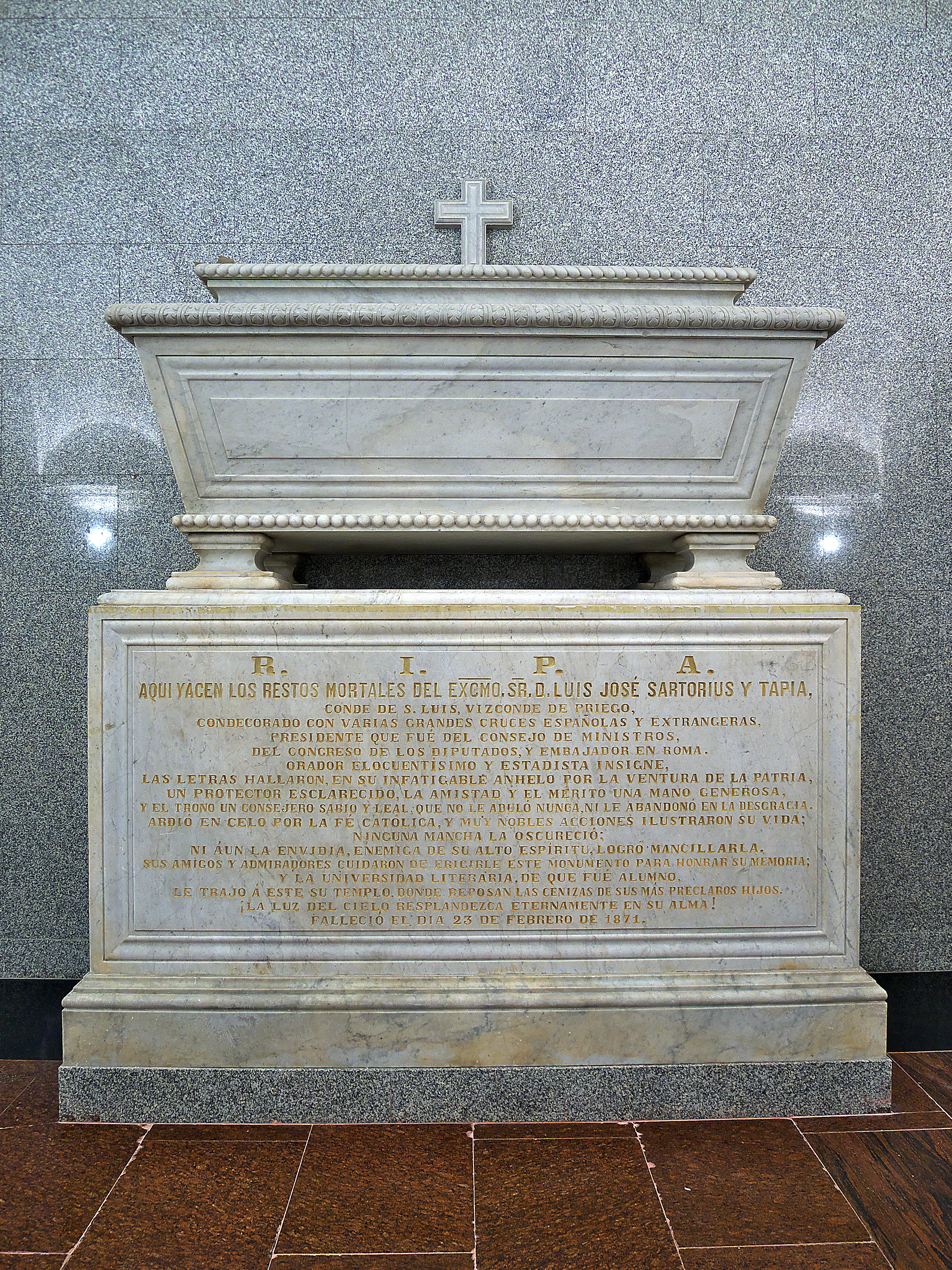 Universidad de Sevilla. Sepulcro del político Luis José Sartorius (1820-1871), que fue presidente del Consejo de Ministro de España entre 1853 y 1854, durante el reinado de Isabel II de España.